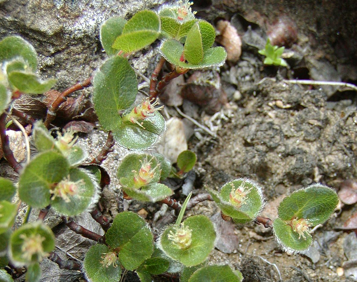 Salix herbacea, N of Rödfjället, Jämtland, Sweden